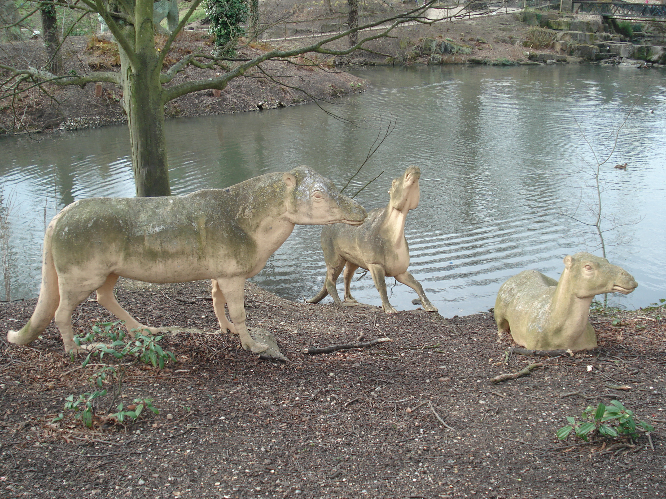 Crystal Palace 'Dinosaurs'